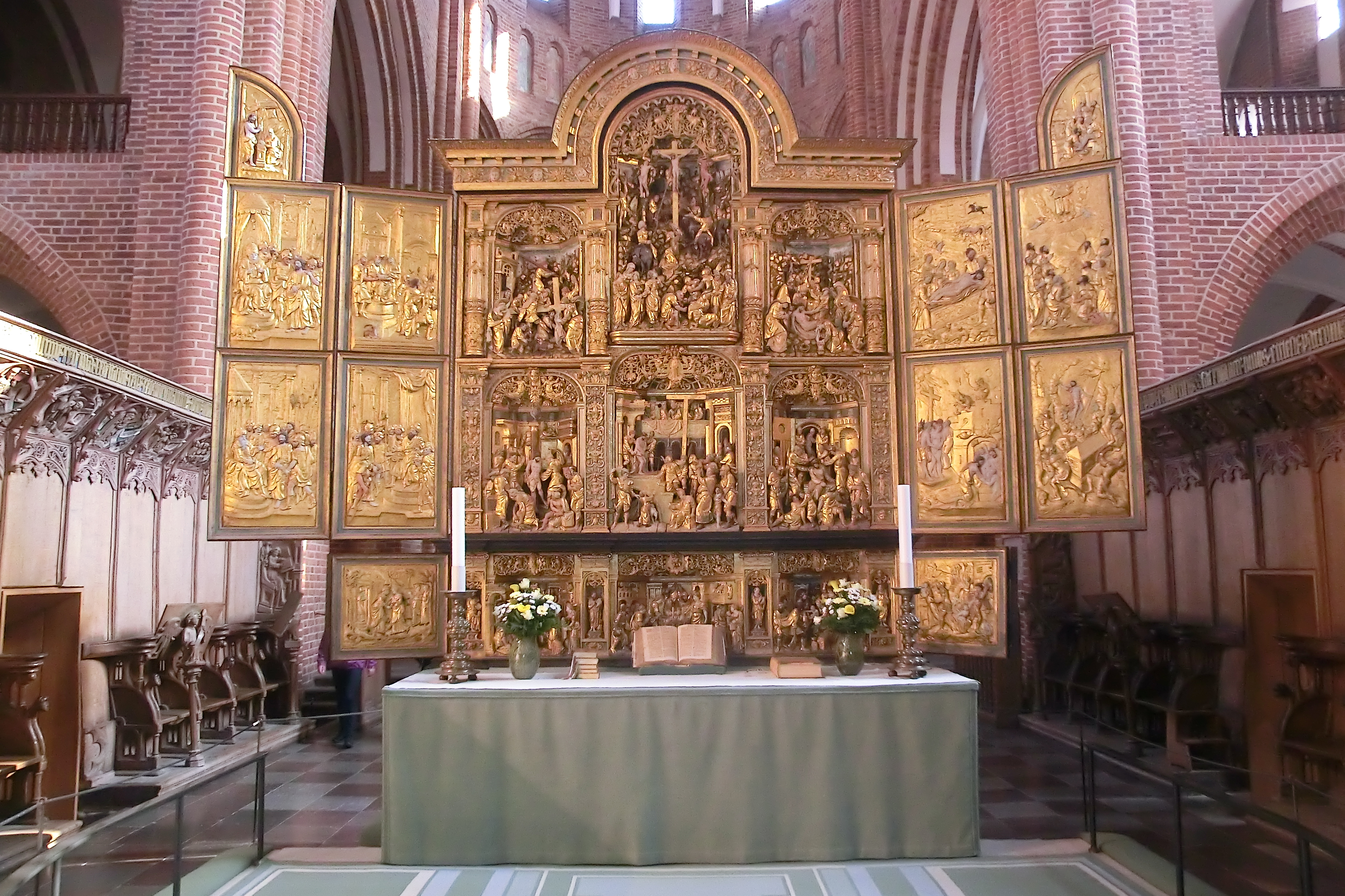 L'altare maggiore Roskilde domkirke